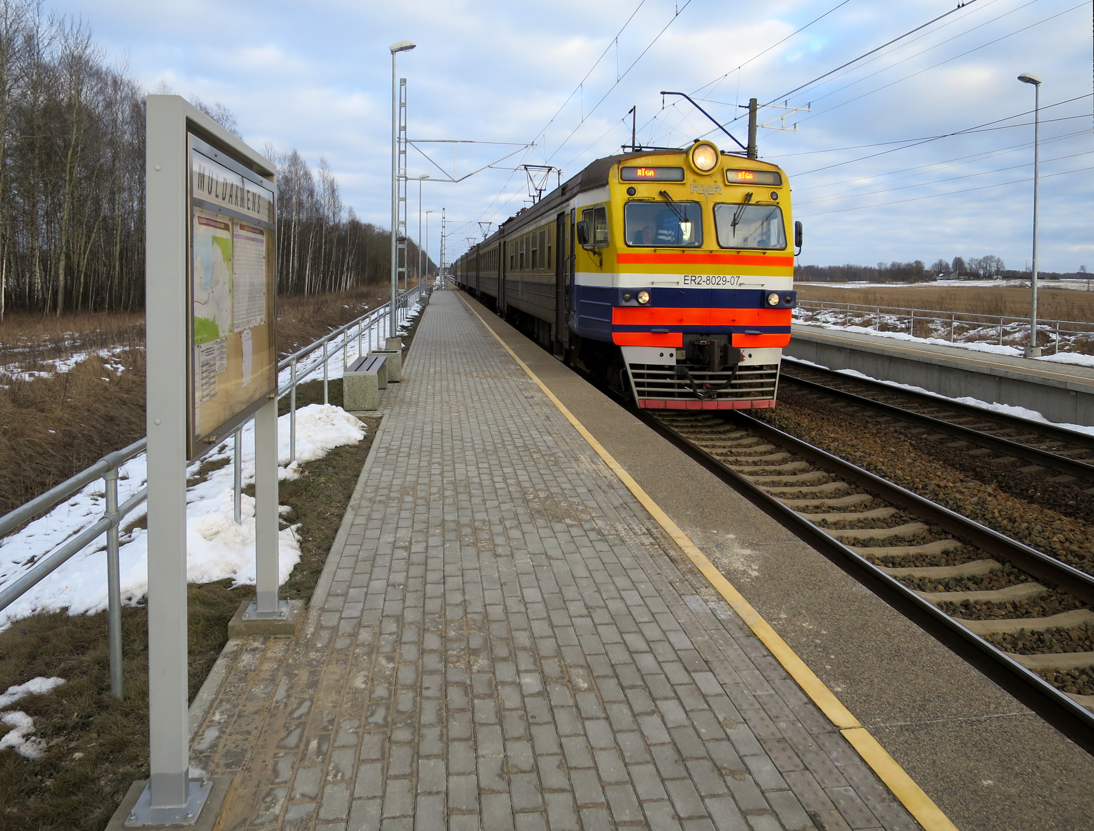 Muldakmens pietura, pienāk vilciens no Aizkraukles uz Rīgu